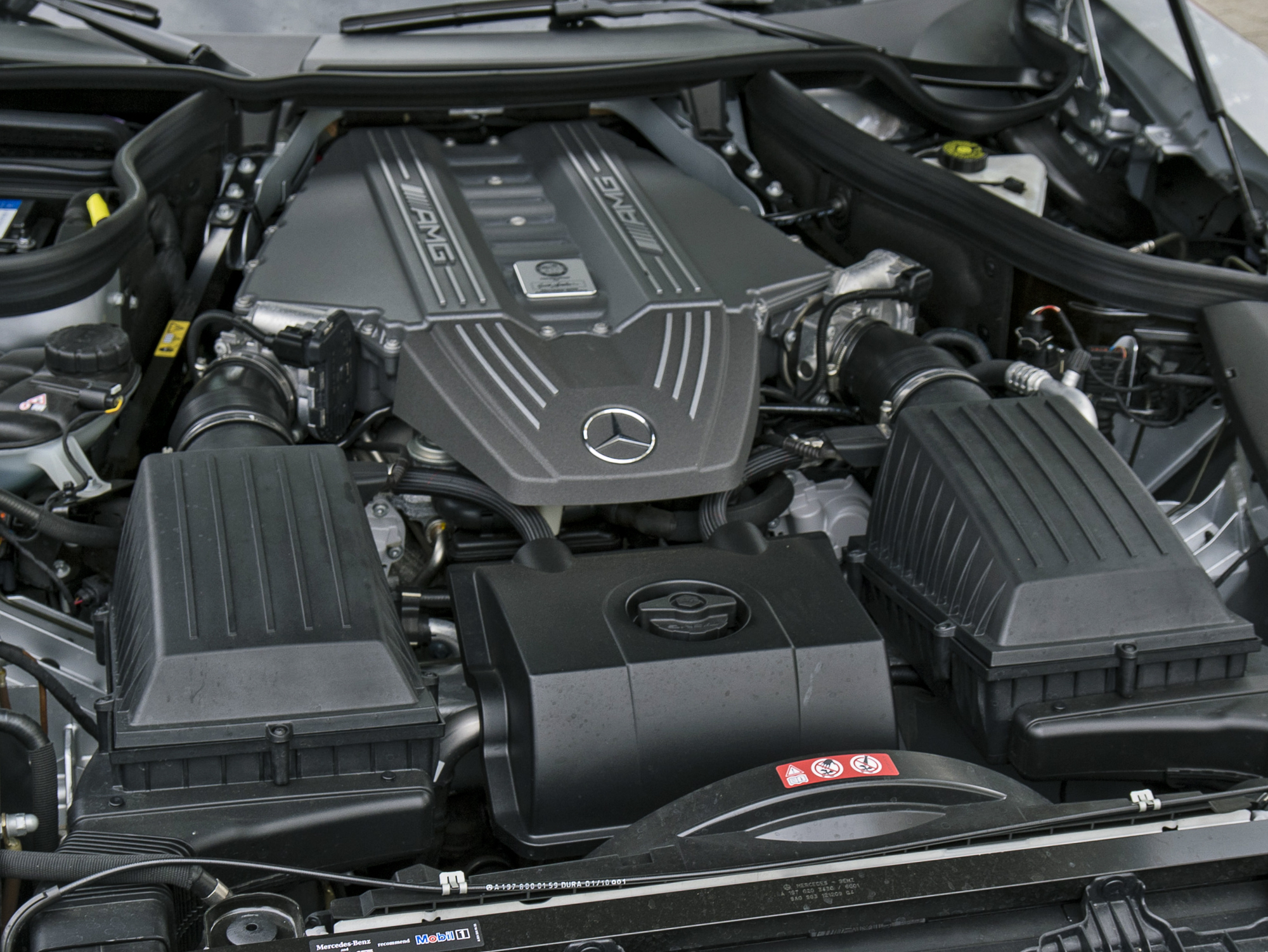 Motor M 159 im Mercedes-Benz SLS AMG (BM 197.377) Ausschnitt aus Wikimedia Commons File: Mercedes SLS Motor 20110416.jpg, Urheber: Rudolf Stricker. Der Urheber gestattet jedermann jede Form der Nutzung, unter der Bedingung der angemessenen Nennung seiner Urheberschaft. Weiterverbreitung, Bearbeitung und kommerzielle Nutzung sind gestattet.